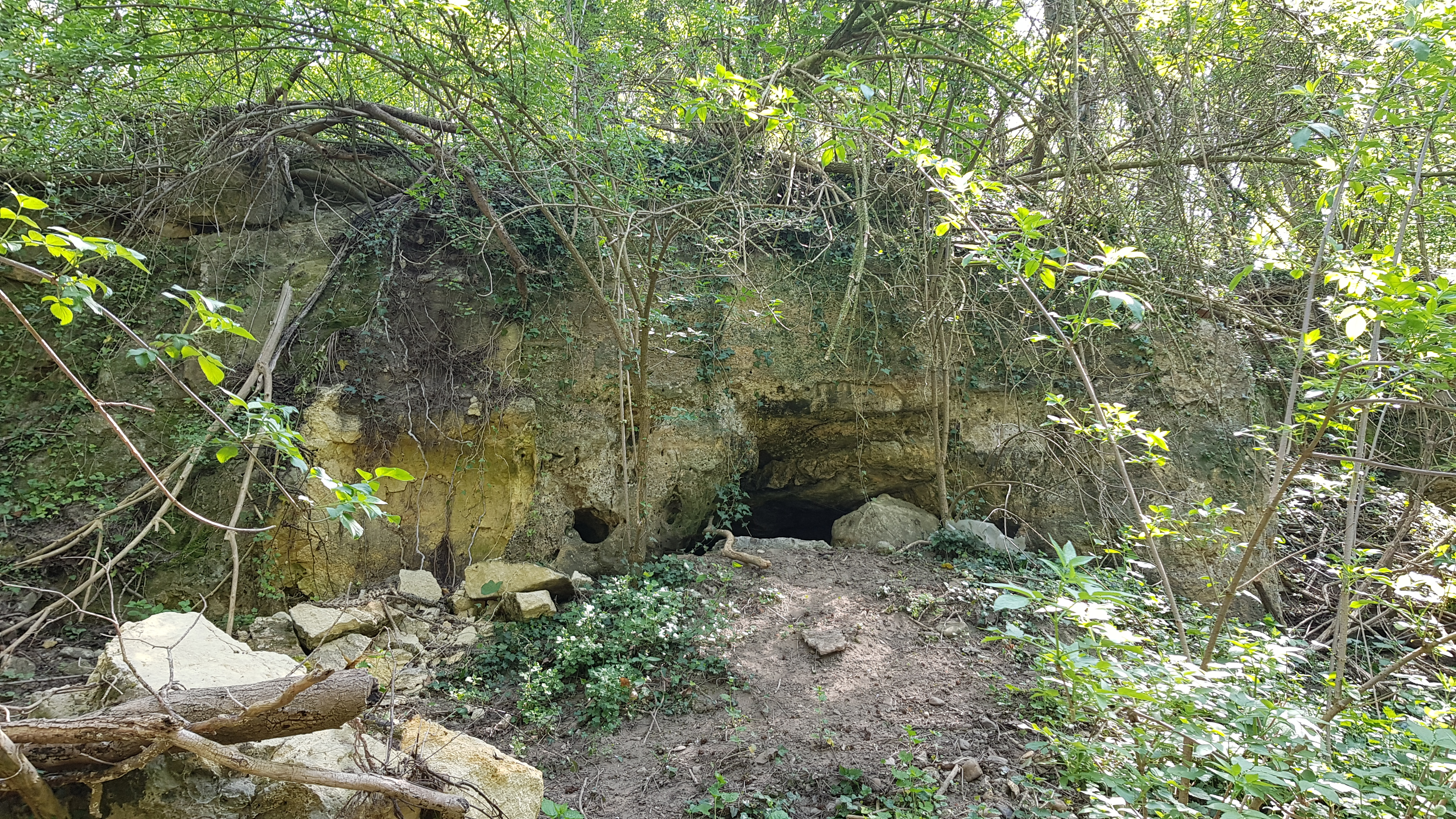 Hotsboomgroeve, Cadier en Keer, Nederland